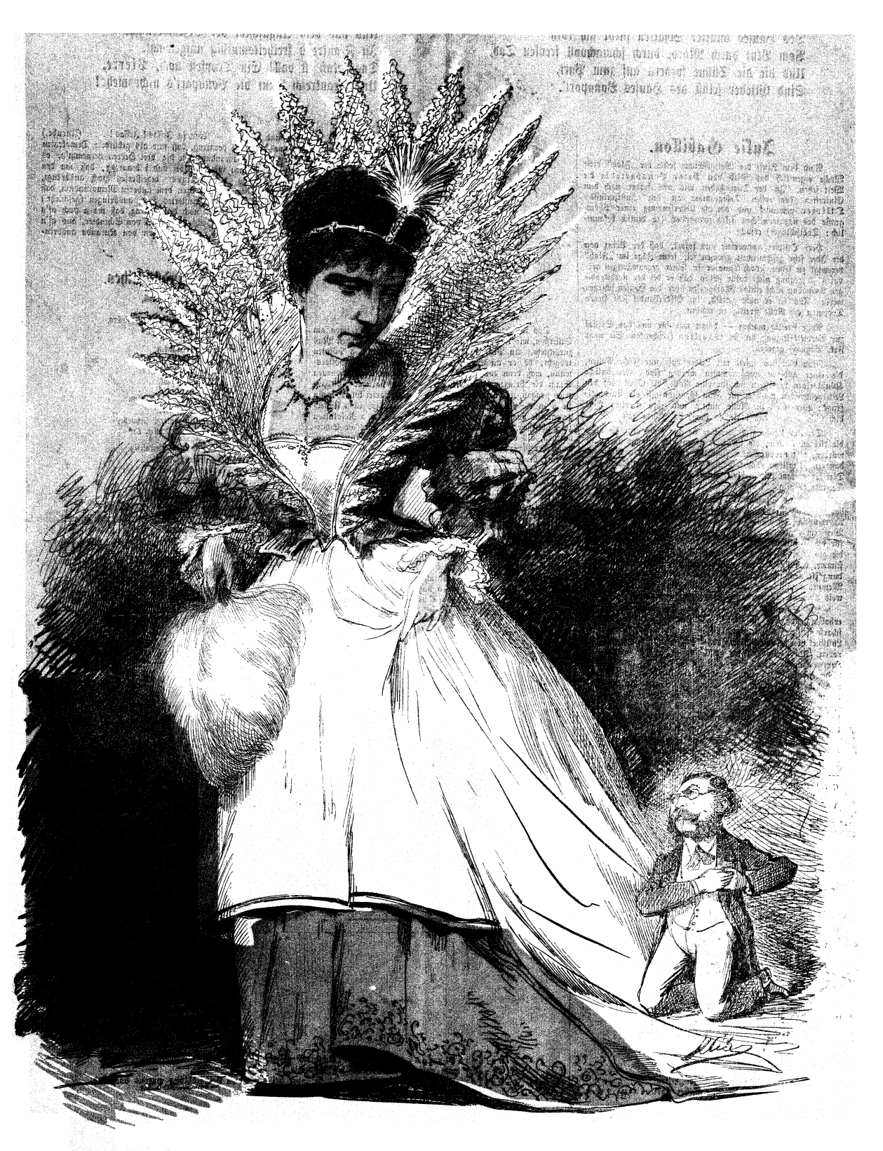 „Charge: Frau Gabillon im Costume mit Spitzen-Stehkragen, zu ihren Füßen kniet Mosenthal“ (Würzburg, Zerline. In: Wurzbach: Biographisches Lexikon des Kaiserthums Oesterreich, Band 58, Wien 1889, S. 258-260, hier S. 260)